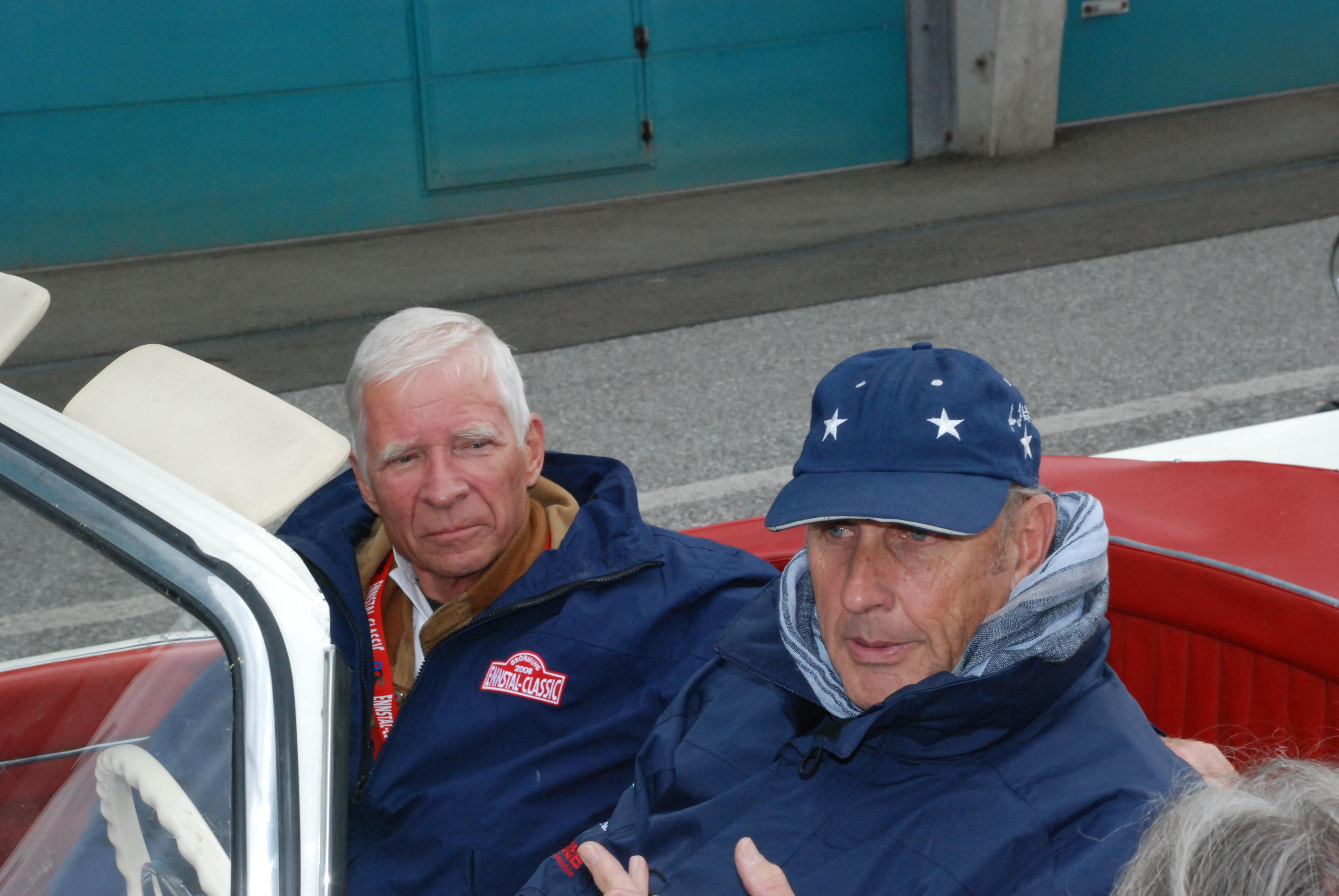 Prof. Dr. Bernd Rosemeyer und Hans Joachim Stuck bei der Ennstal-Classic 2008